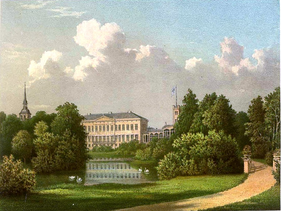 Schloss Semlow, Lithografie aus dem 19. Jahrhundert